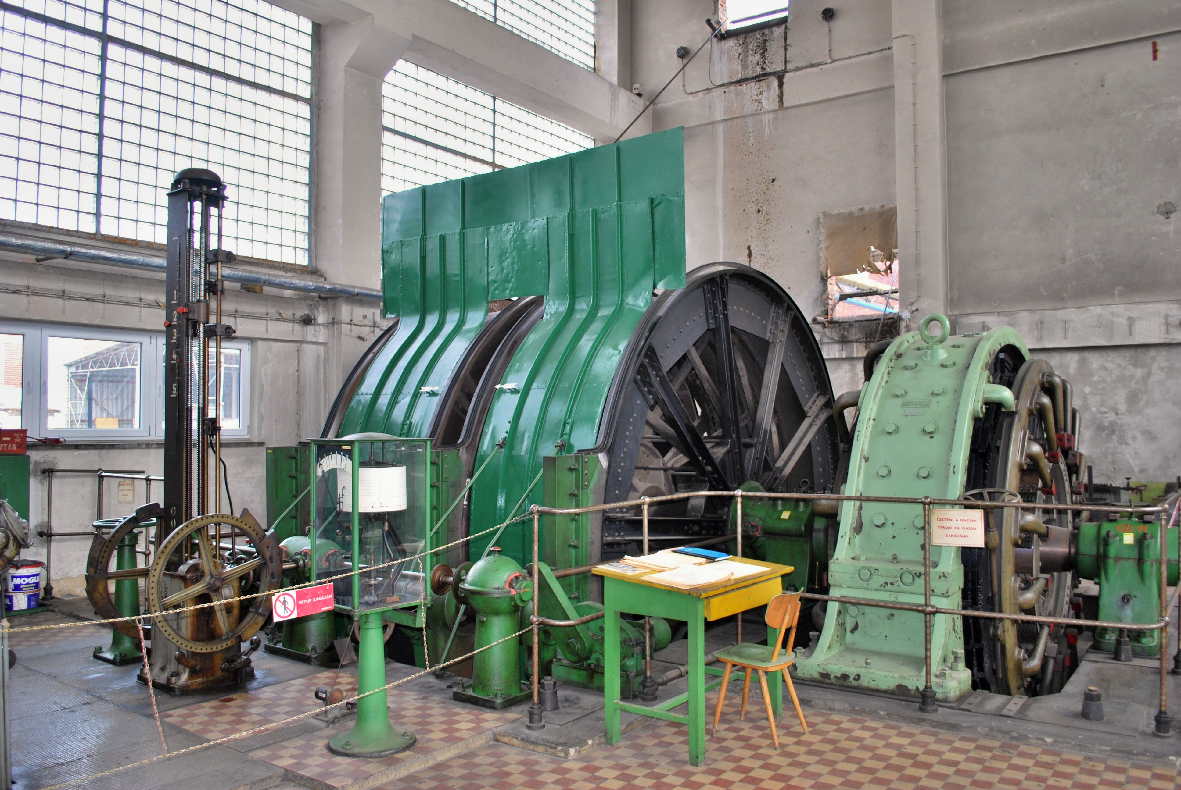 Uhelný důl hlubinný - vybavení jámy Louis, z toho jen: těžní stroj, kompresor, kotle - pohon roštu (Ostrava), Vítkovice, Jeremenko, Ostrava Památkový katalog MonumNet MIS hledat obrázky hledat seznamy